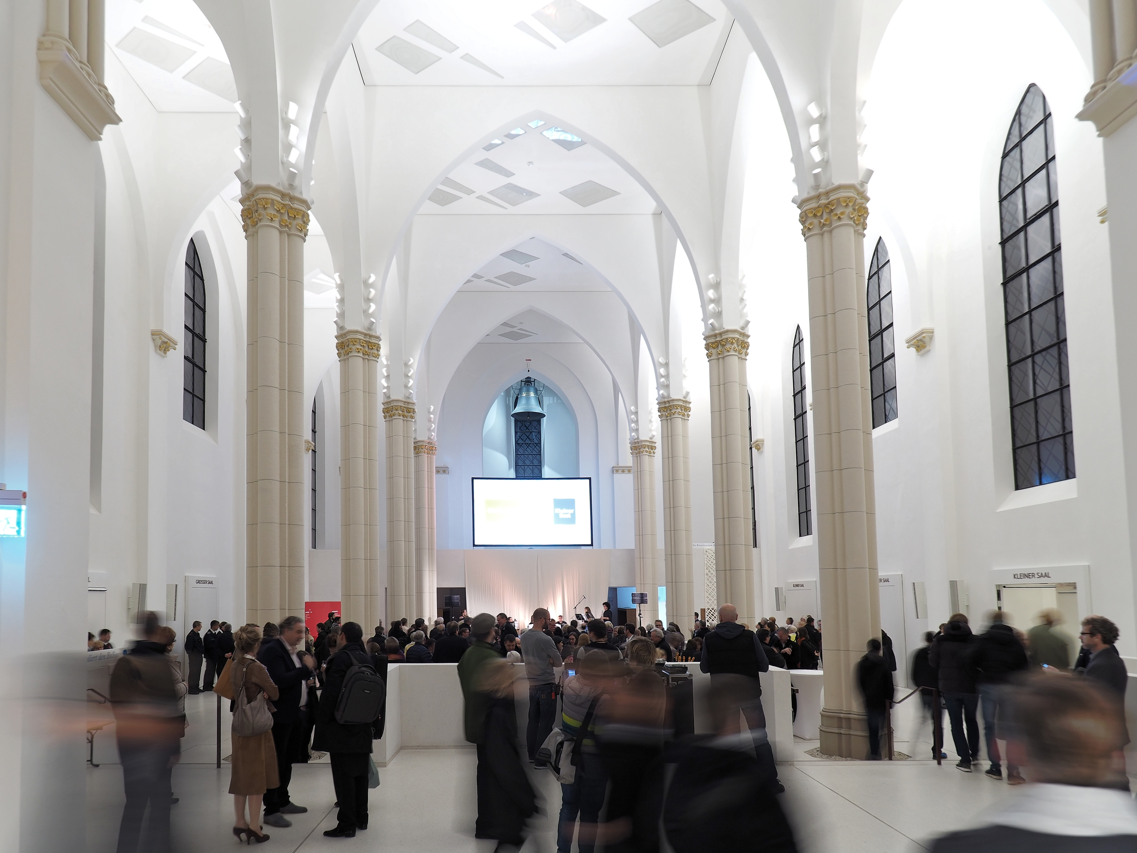 Anneliese Brost Musikforum Ruhr in Bochum, Innenansicht des Foyes mit Blick vom Chor zum Turm anläßlich der Einweihungsfeierlichkeiten